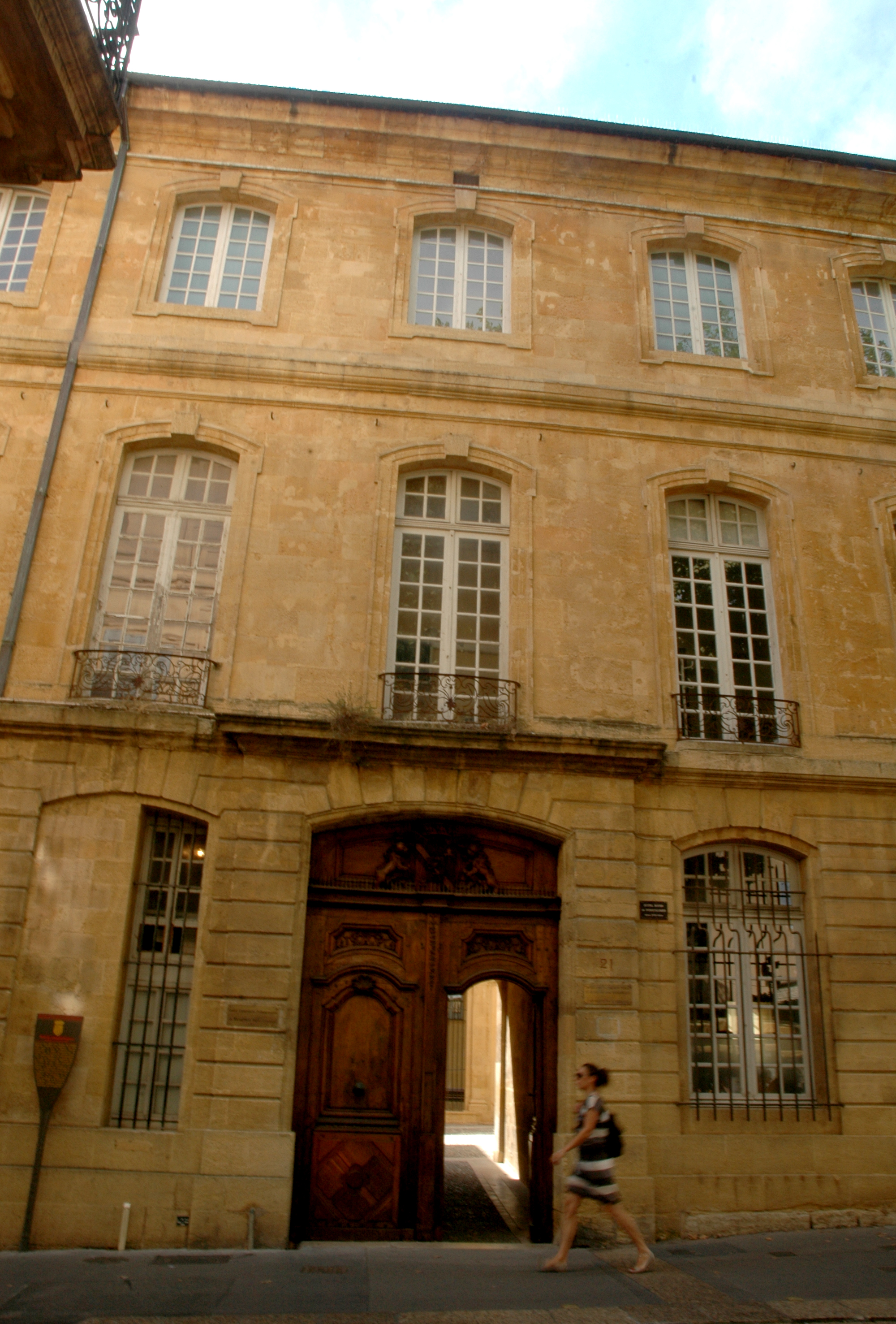 Aix-en-Provence